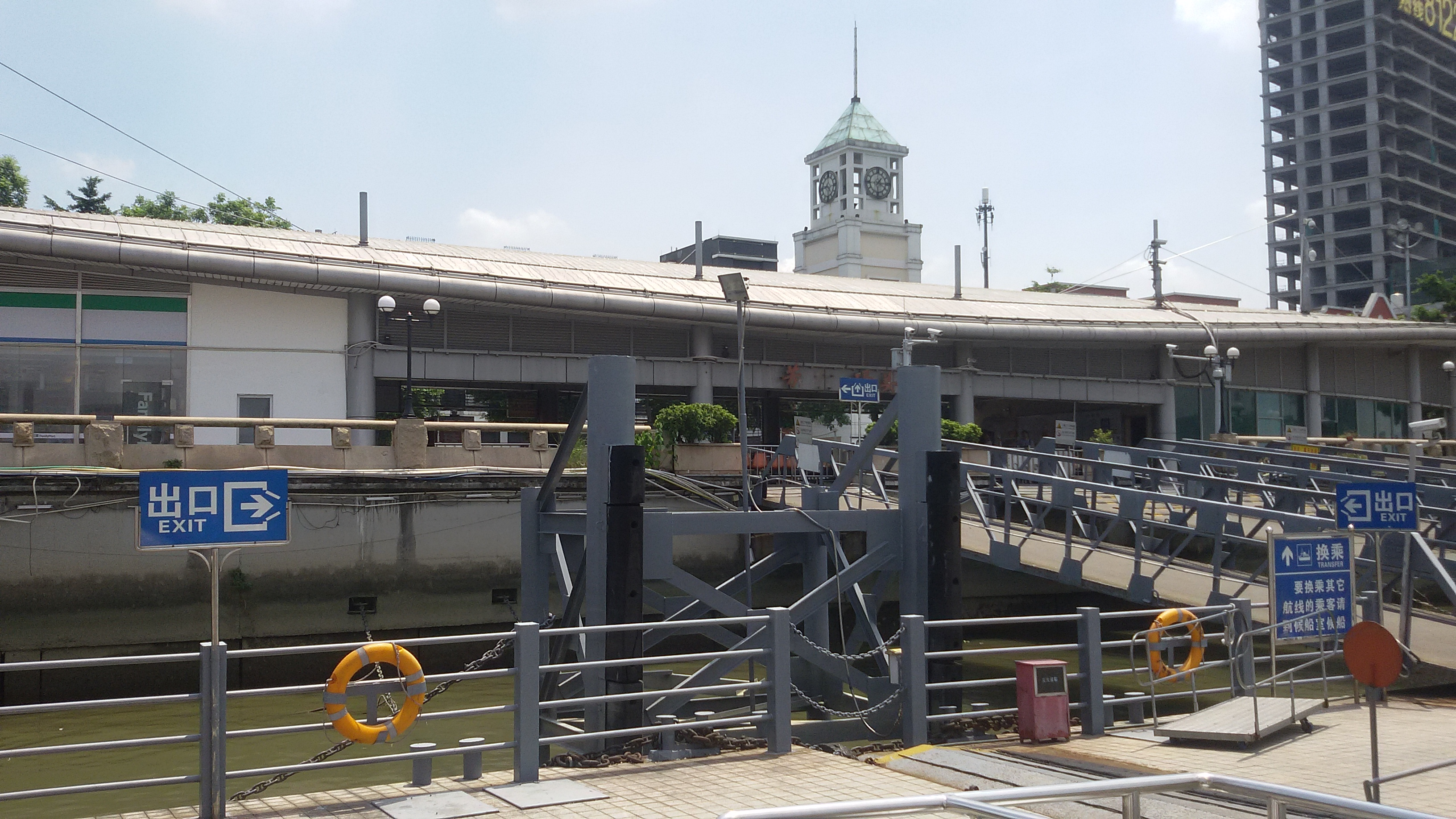 粵語: 芳村碼頭